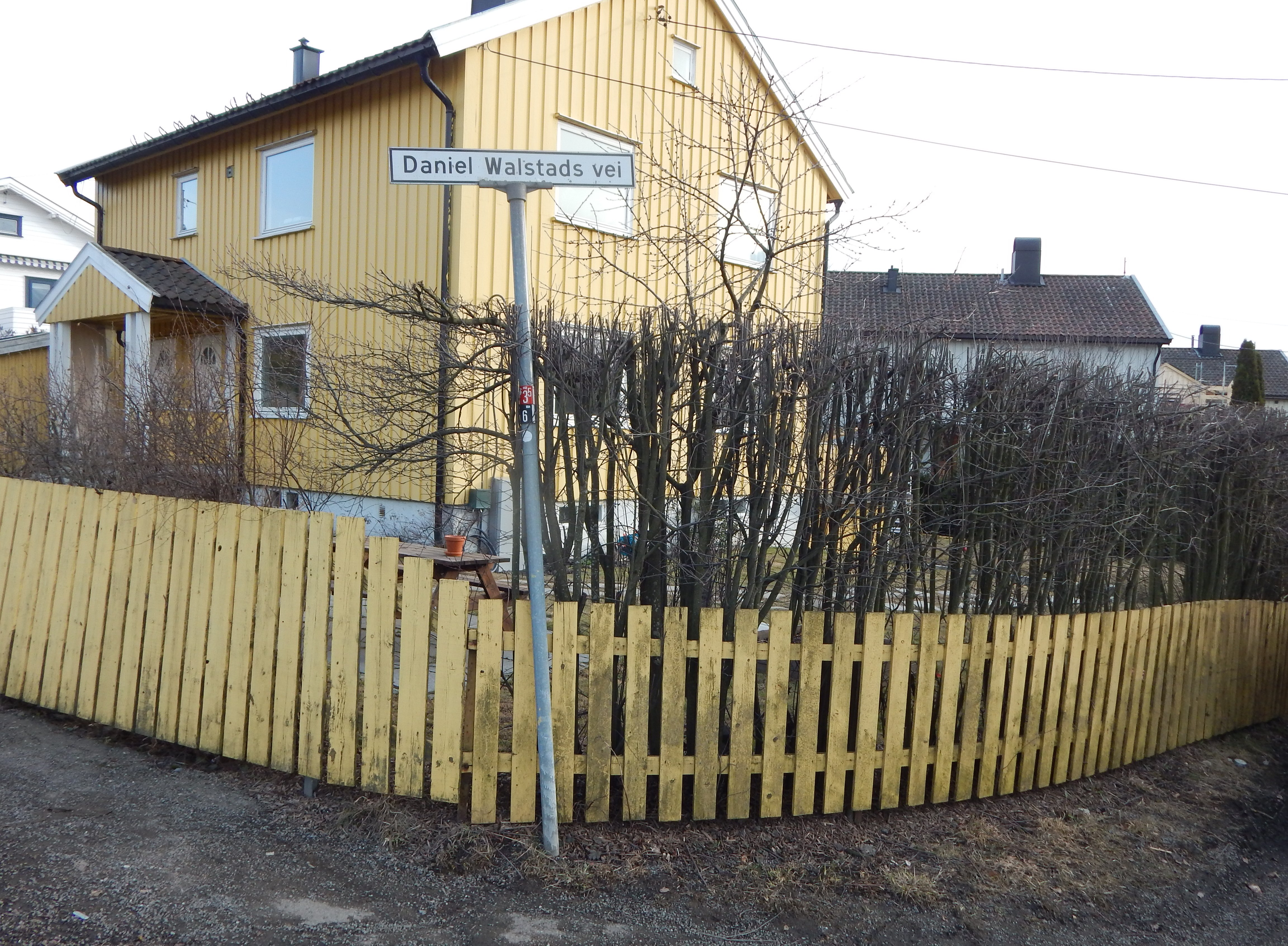 Daniel Walstads vei på Kjelsås